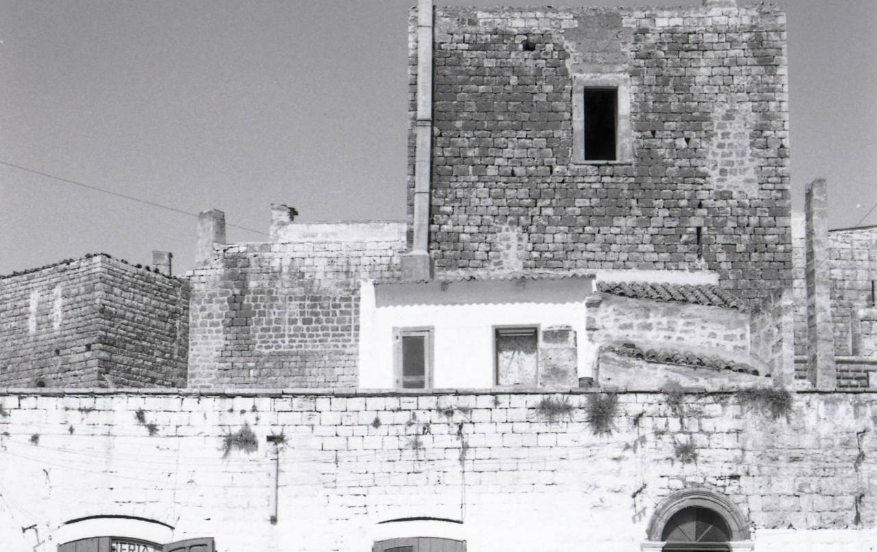 Servizio fotografico : Sannicandro di Bari, 1970 / Paolo Monti. - Strisce: 6, Fotogrammi complessivi: 27 : Negativo b/n, gelatina bromuro d'argento/ pellicola ; 35 mm. - ((I fotogrammi hanno una doppia numerazione. . - Sul portanegativi: Nikmat FP4. - Sul dorso del portanegativi Monti specifica: "Gruppo case bianche". - Occasione: Documentazione per la pubblicazione di: Calò Mariani Maria Stella, "L'arte del duecento in Puglia", Torino, Istituto Bancario San Paolo, 1984. - Fonte: Agenda di Paolo Monti: Monti - Agenda 1970 (1970), presso Archivio Paolo Monti